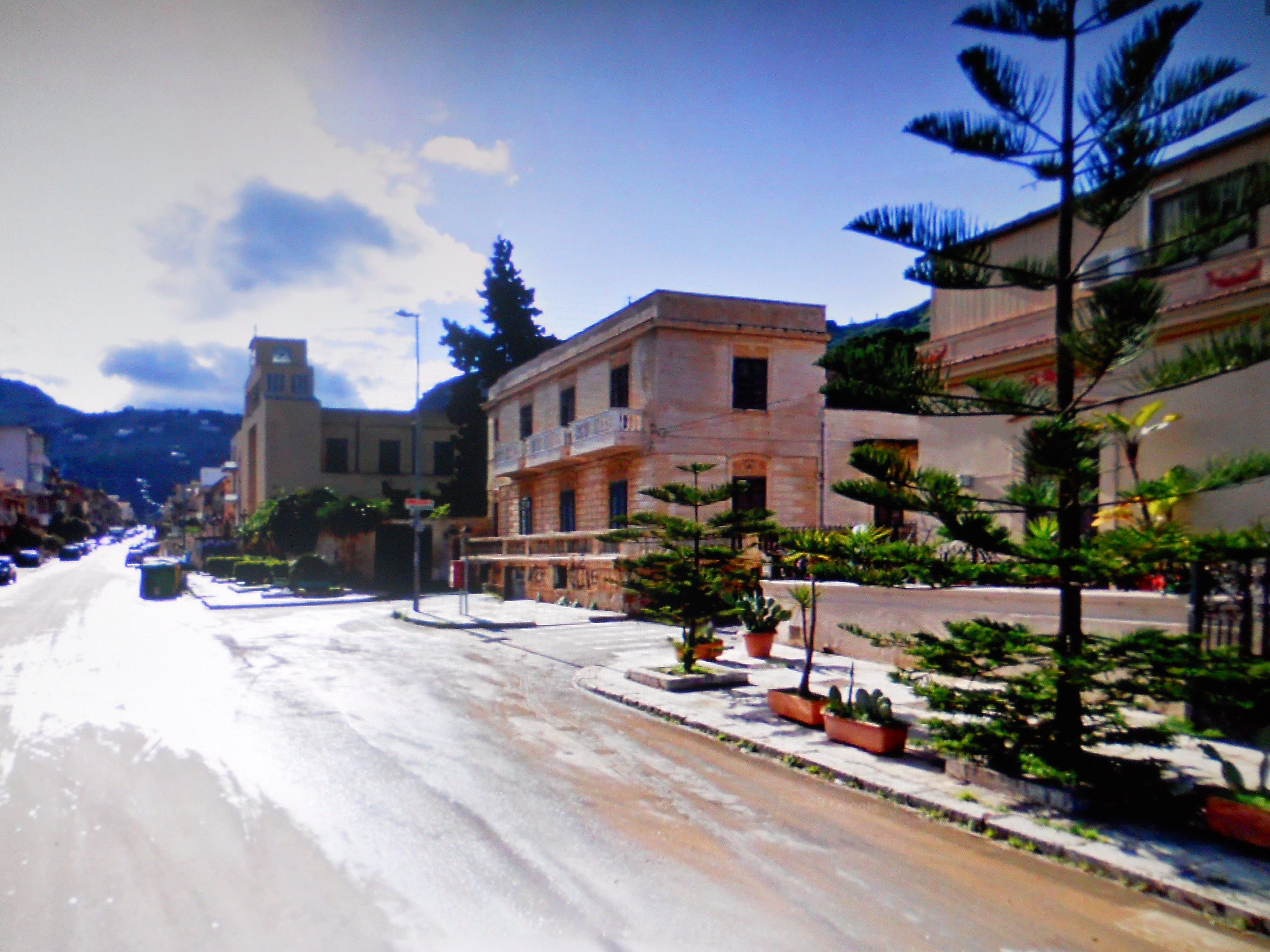 Piazzetta principale della borgata di Croceverde-Giardina